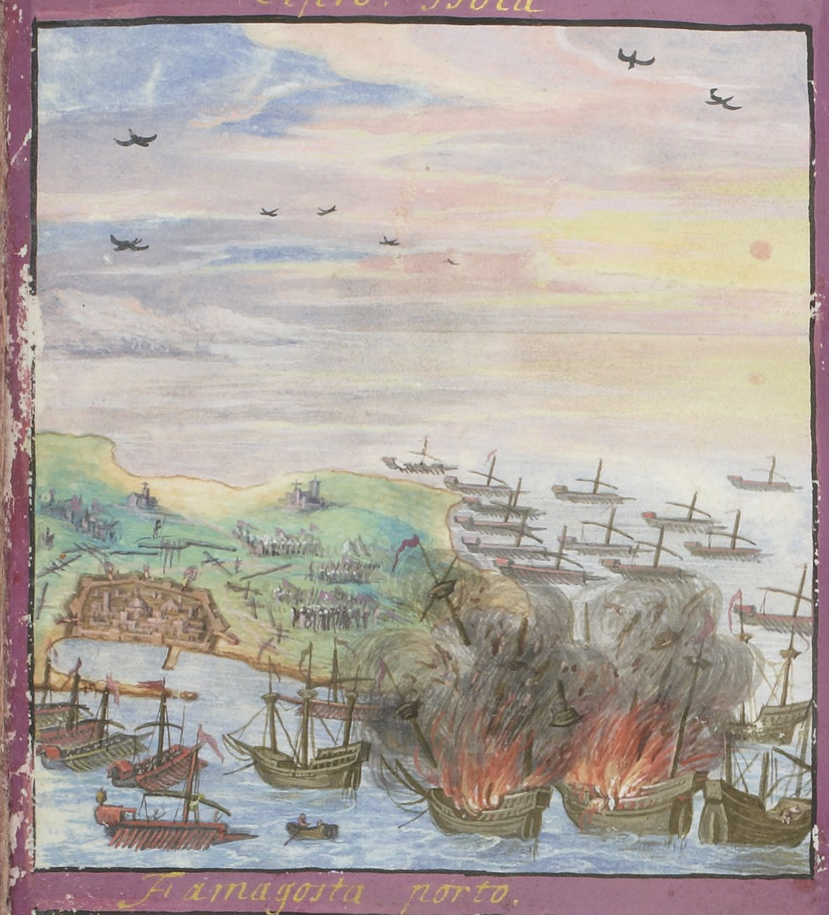 Voyages et aventures de Ch. Magius, Bibliothèque nationale de France, département Estampes et photographie, RESERVE 4-AD-134, detail de la miniature no. 13; port de Famagouste